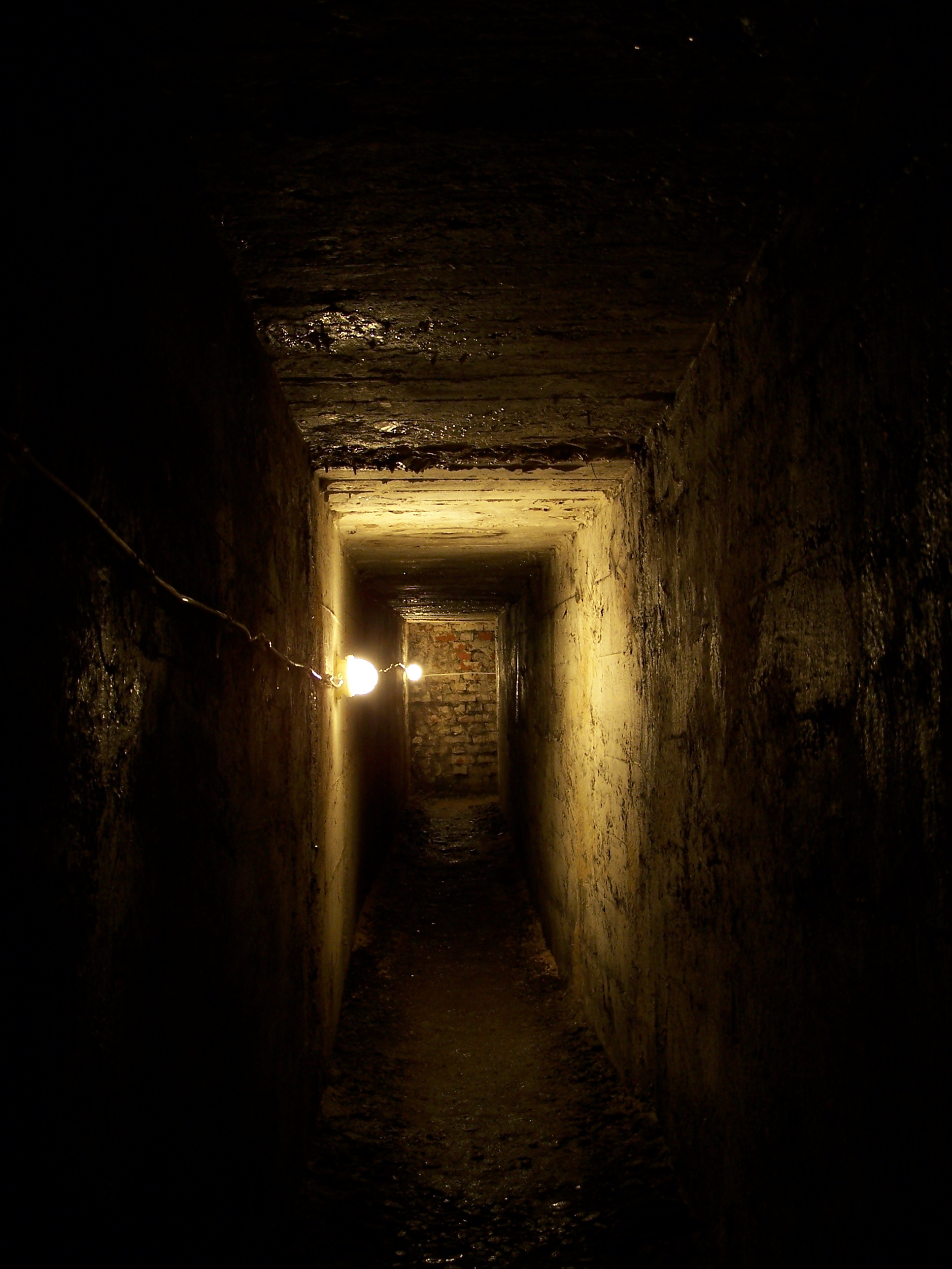 Podziemne korytarze pod gmachem Urzędu Wojewódzkiego w Katowicach.